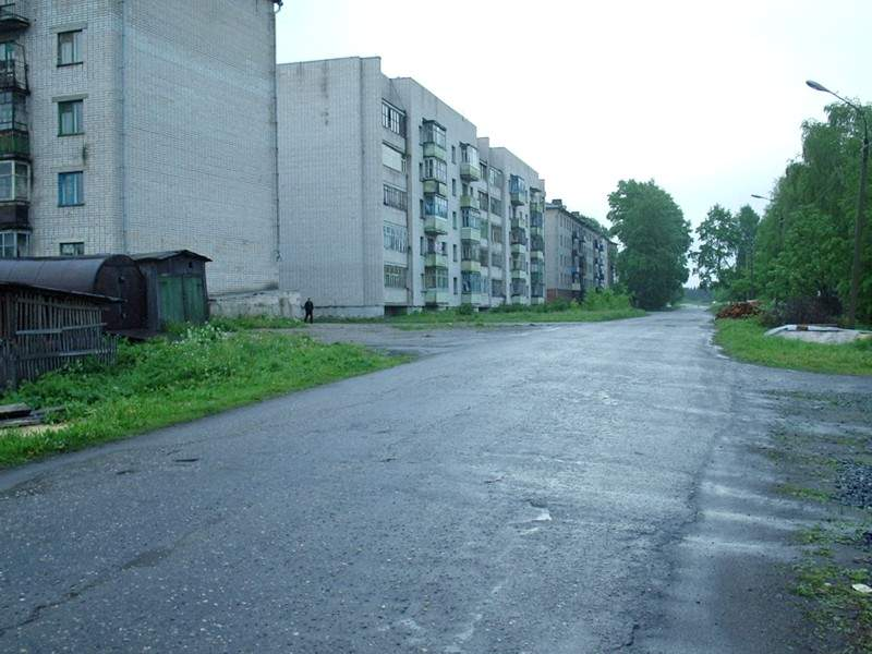 Харовск, Вологодская область.